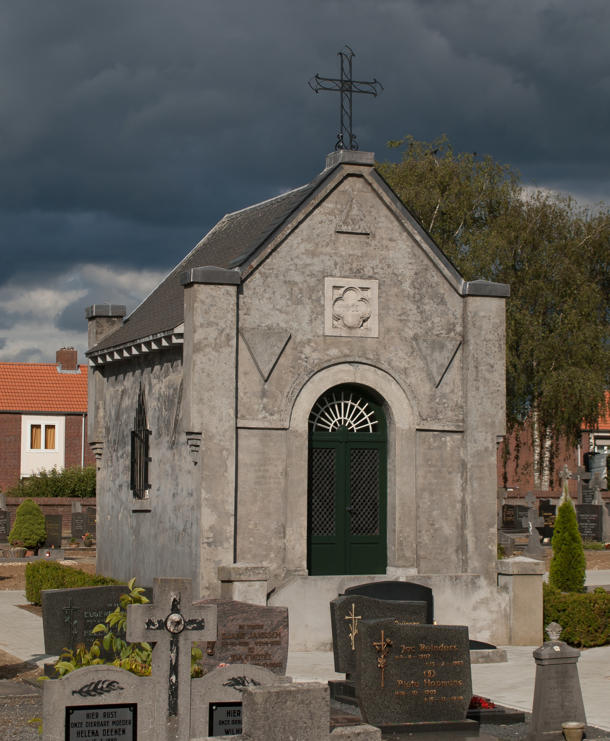 Grafkapel Geradts-Mulbracht, Posterholt